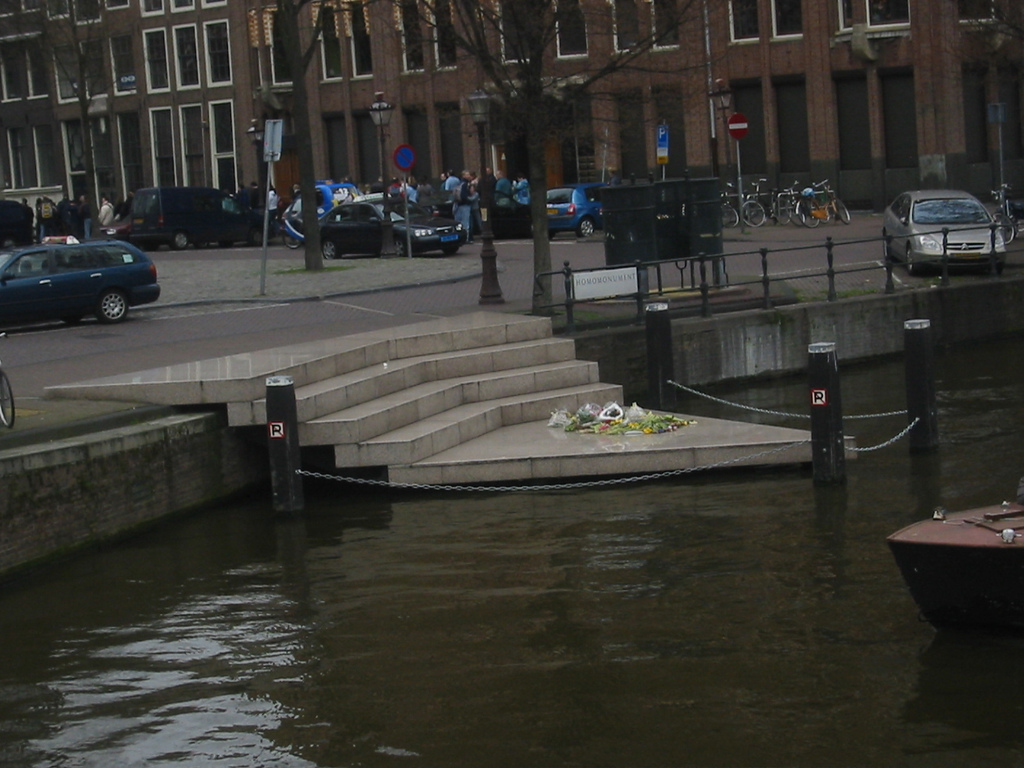 Homomonument, Amsterdam